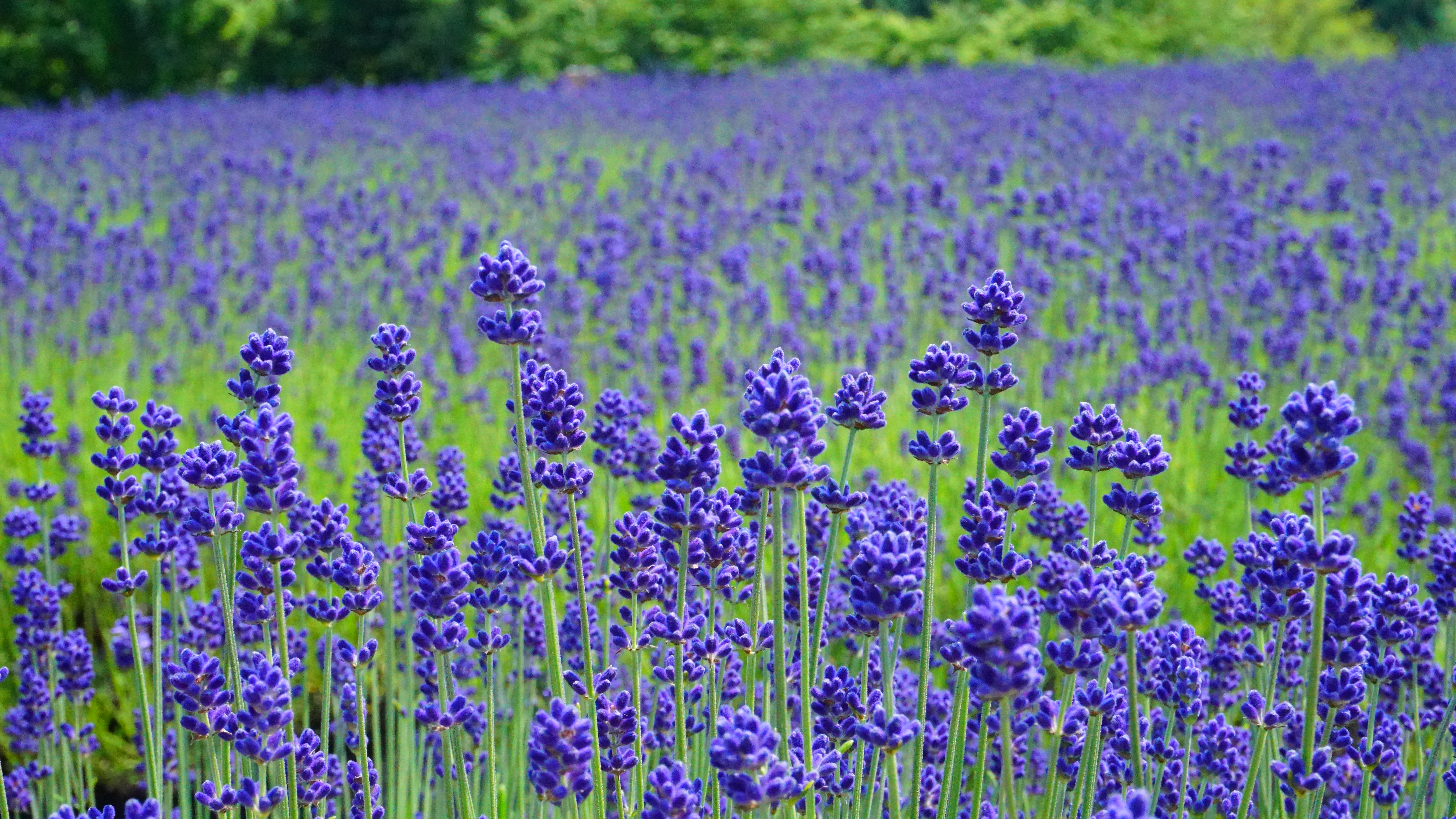 美郷町ラベンダー園にて（秋田県仙北郡）